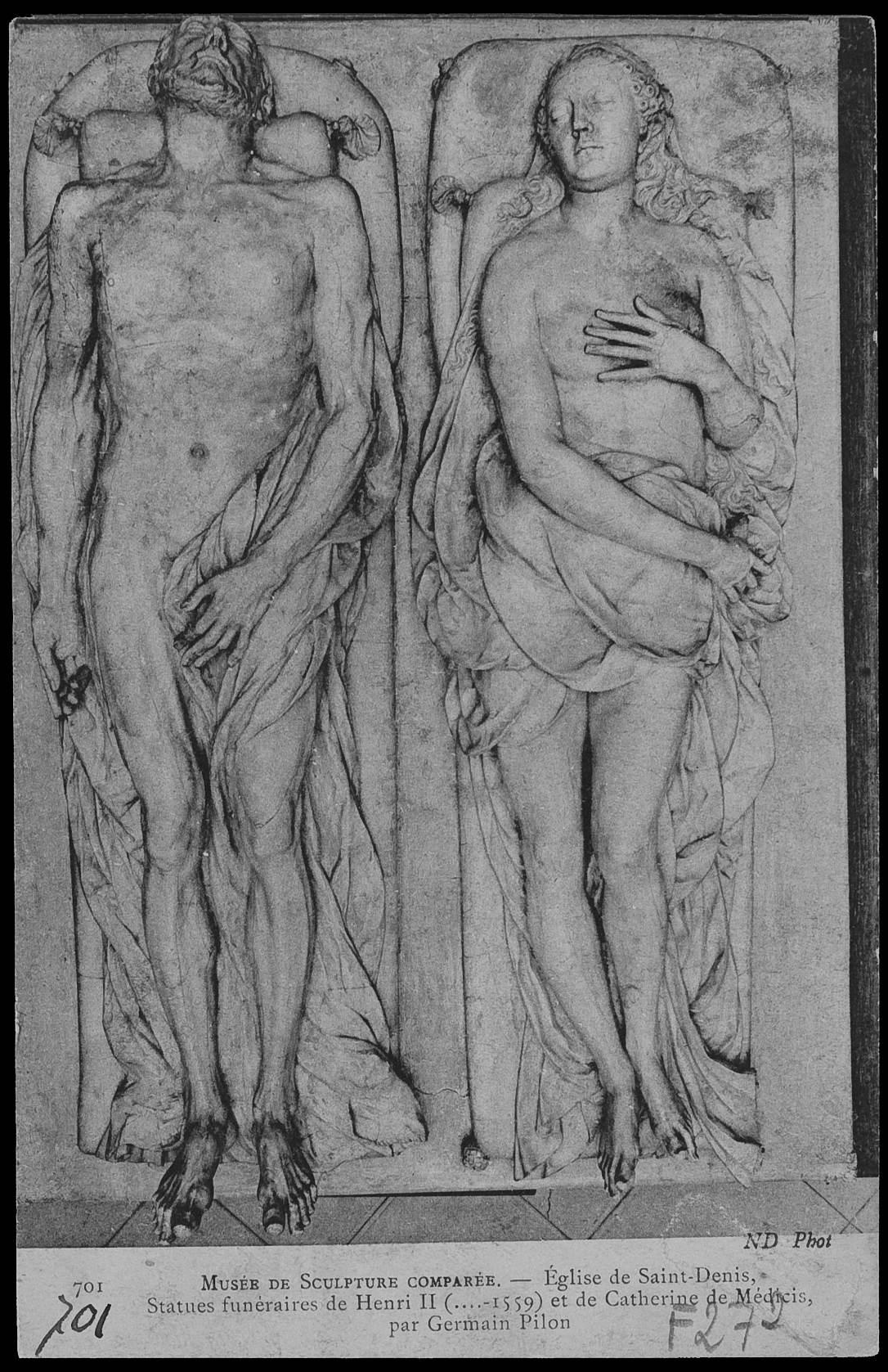 Fotografía grupo funerario Enrique II y Catalina de Médicis, de Germain Pilon.